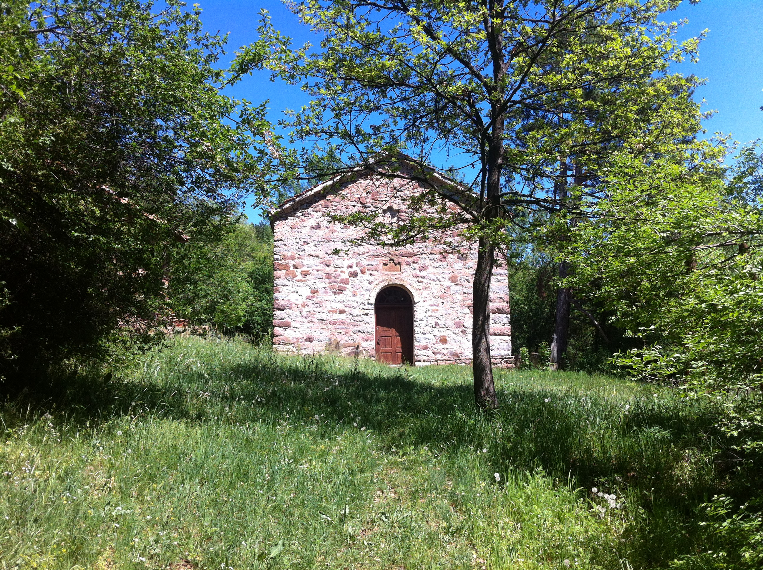 carkvata Sveta Petka